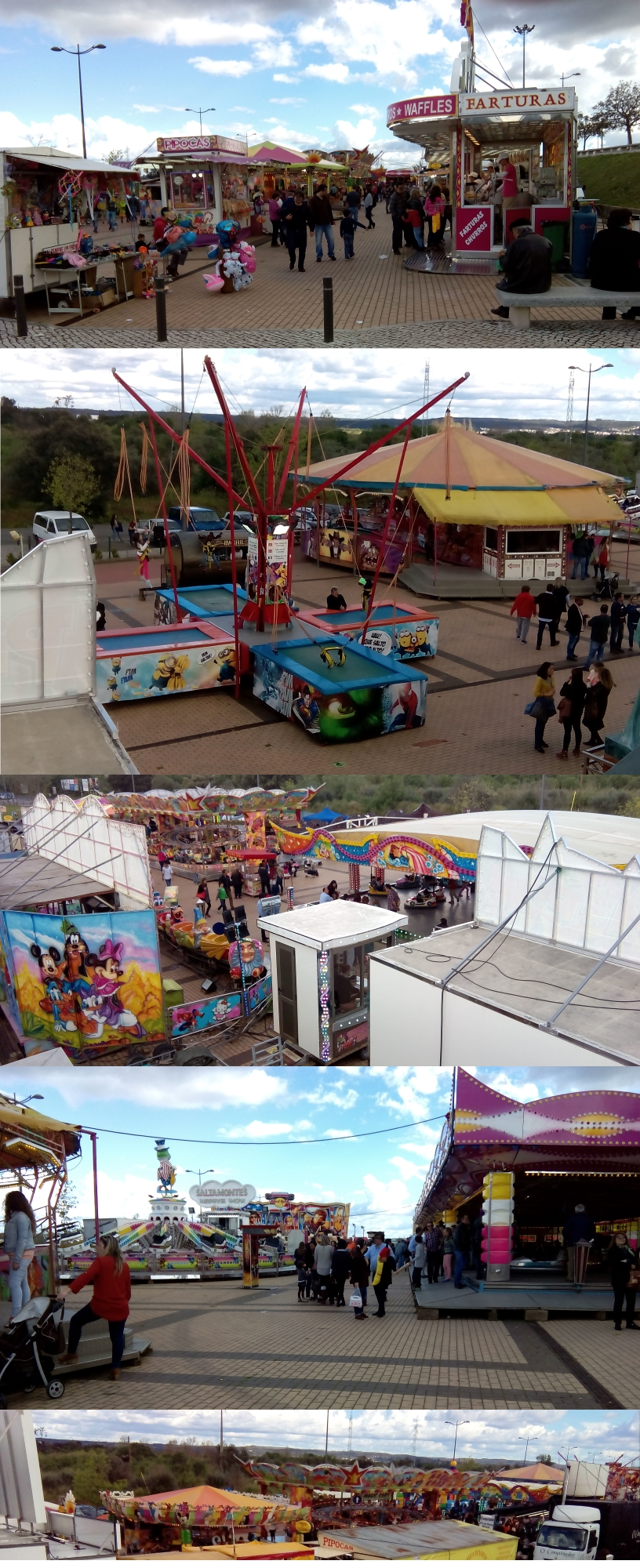 Perspetivas do espaço onde decorreu a feira de abril (2016) no Entroncamento, Portugal.